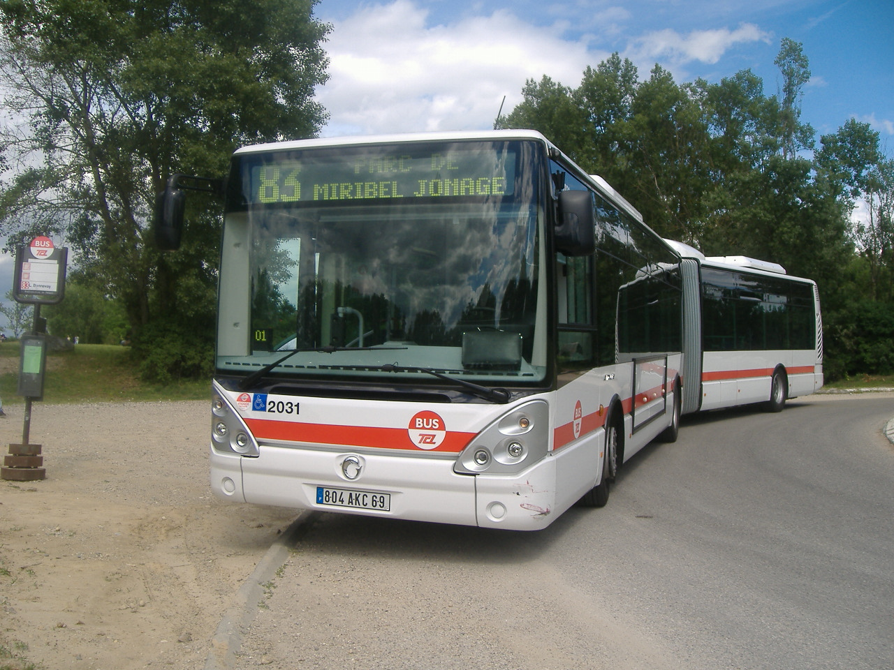 Ligne de bus 83 au Parc de Miribel-Jonage, près de Lyon, en France